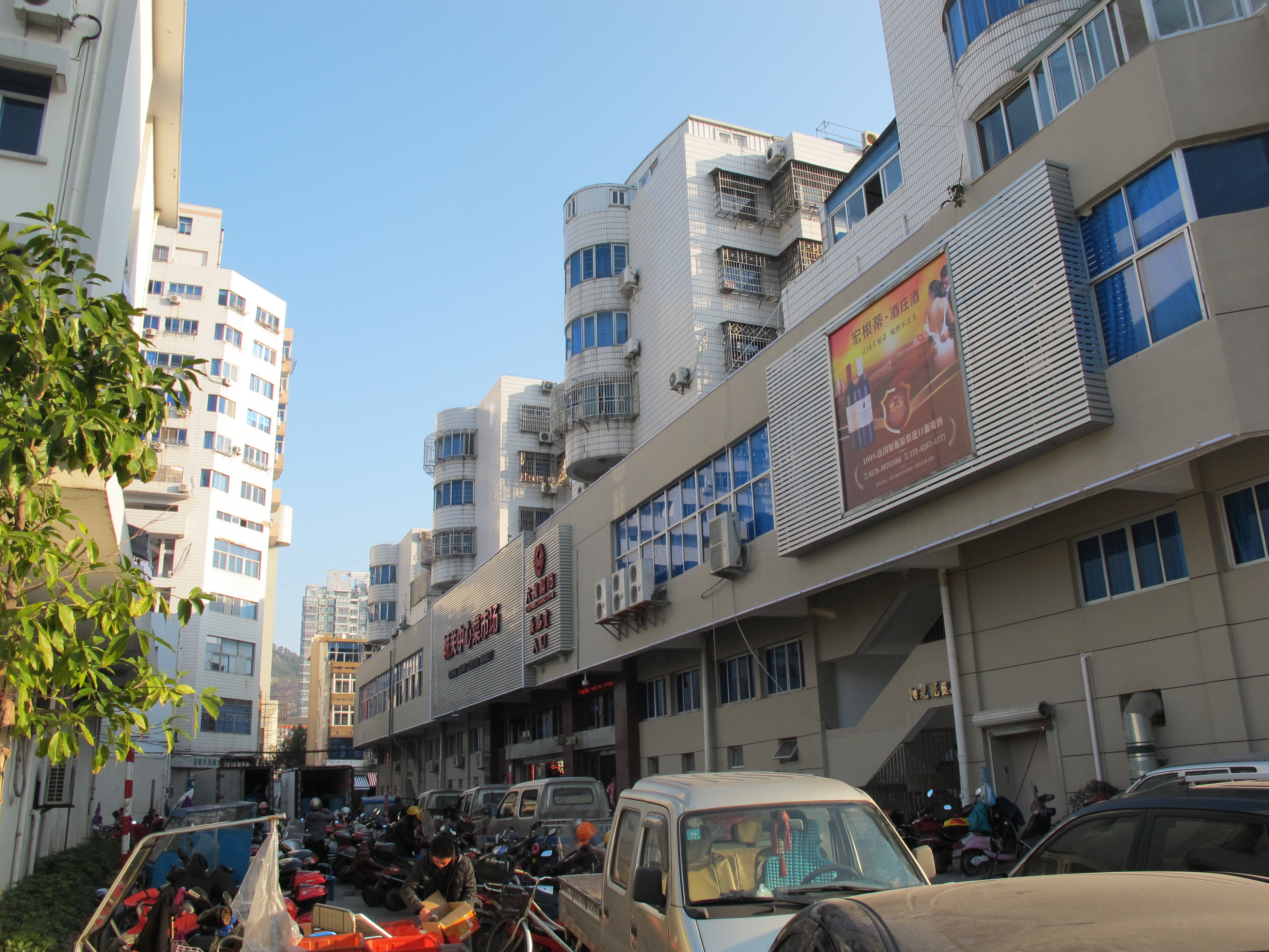 玉环中心菜市场